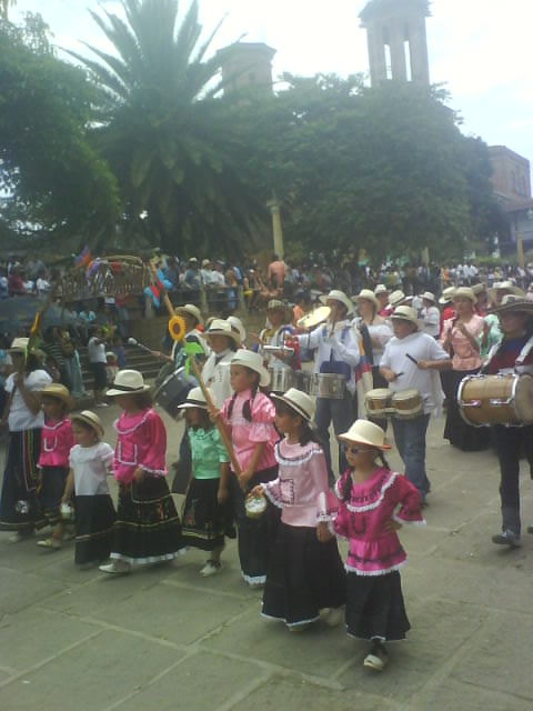 Estación del Ferrocarril Provincia